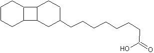 Химическая формула жирной карболовой кислоты